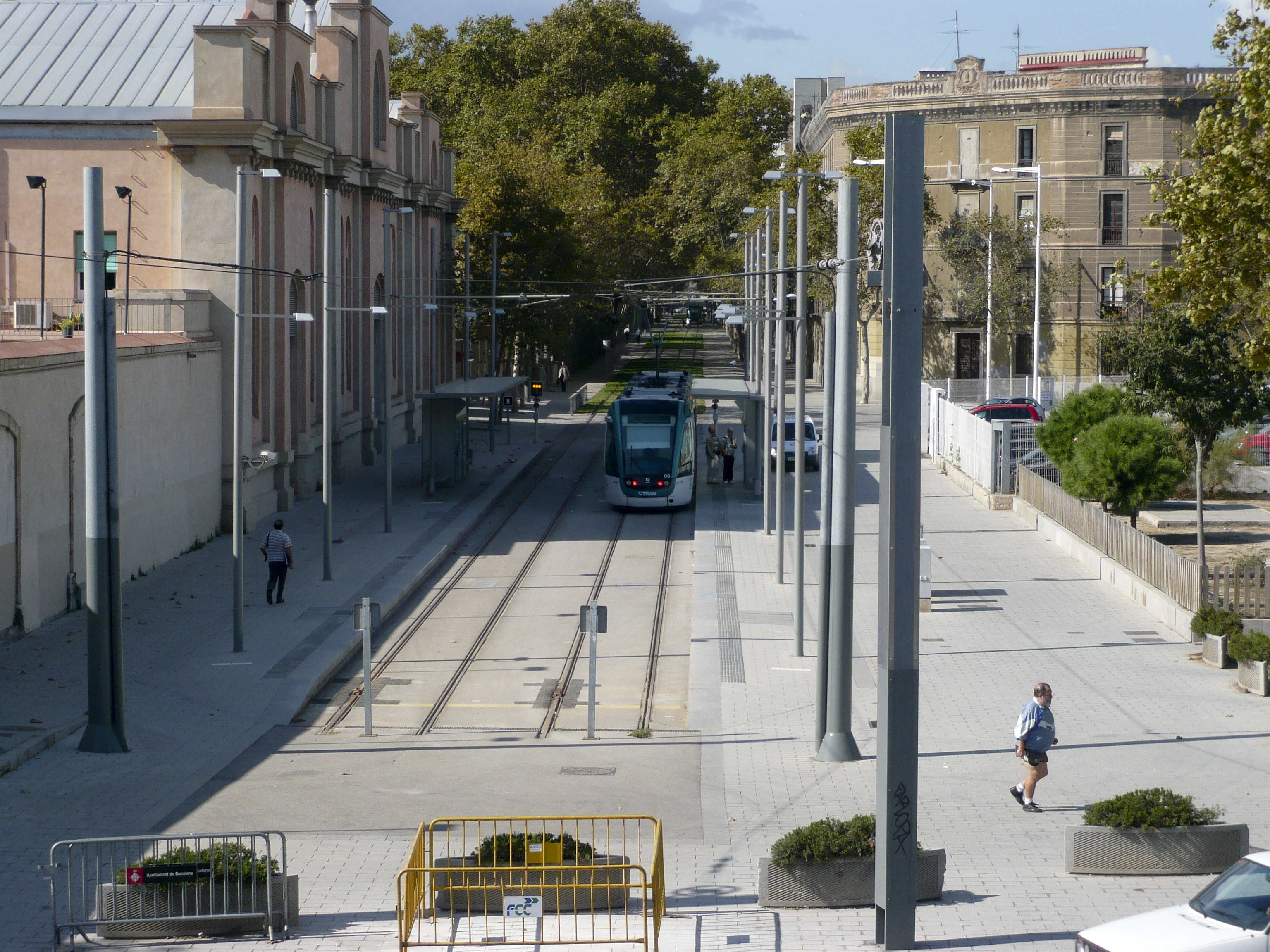 Barcelona Trams